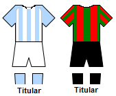 Uniforme titular de ambos equipos